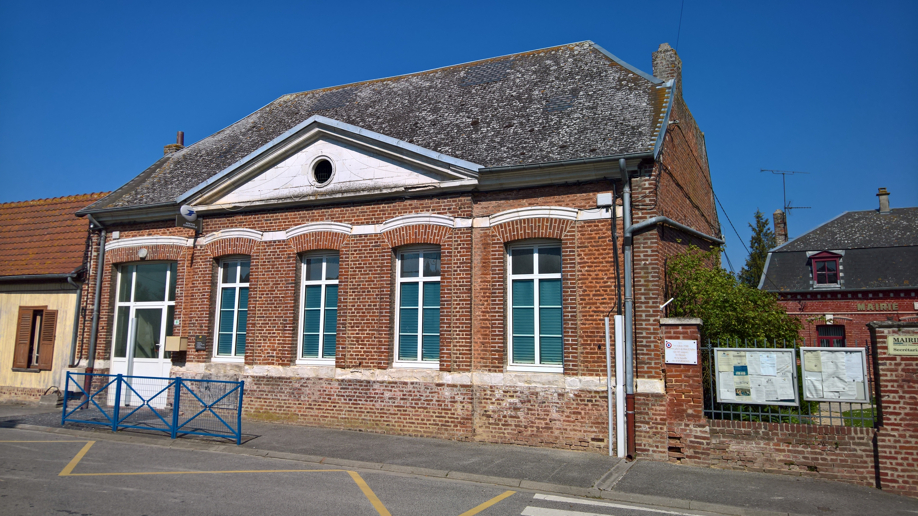 Namps-Mesnil (Somme) - Village de Namps-au-Val : L'ancienne école occupée en partie par l'agence postale communale